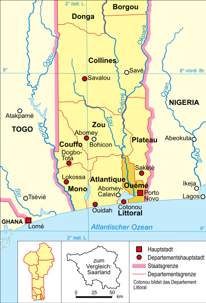 Politische Karte Benins (Departement Ouémé hervorgehoben)